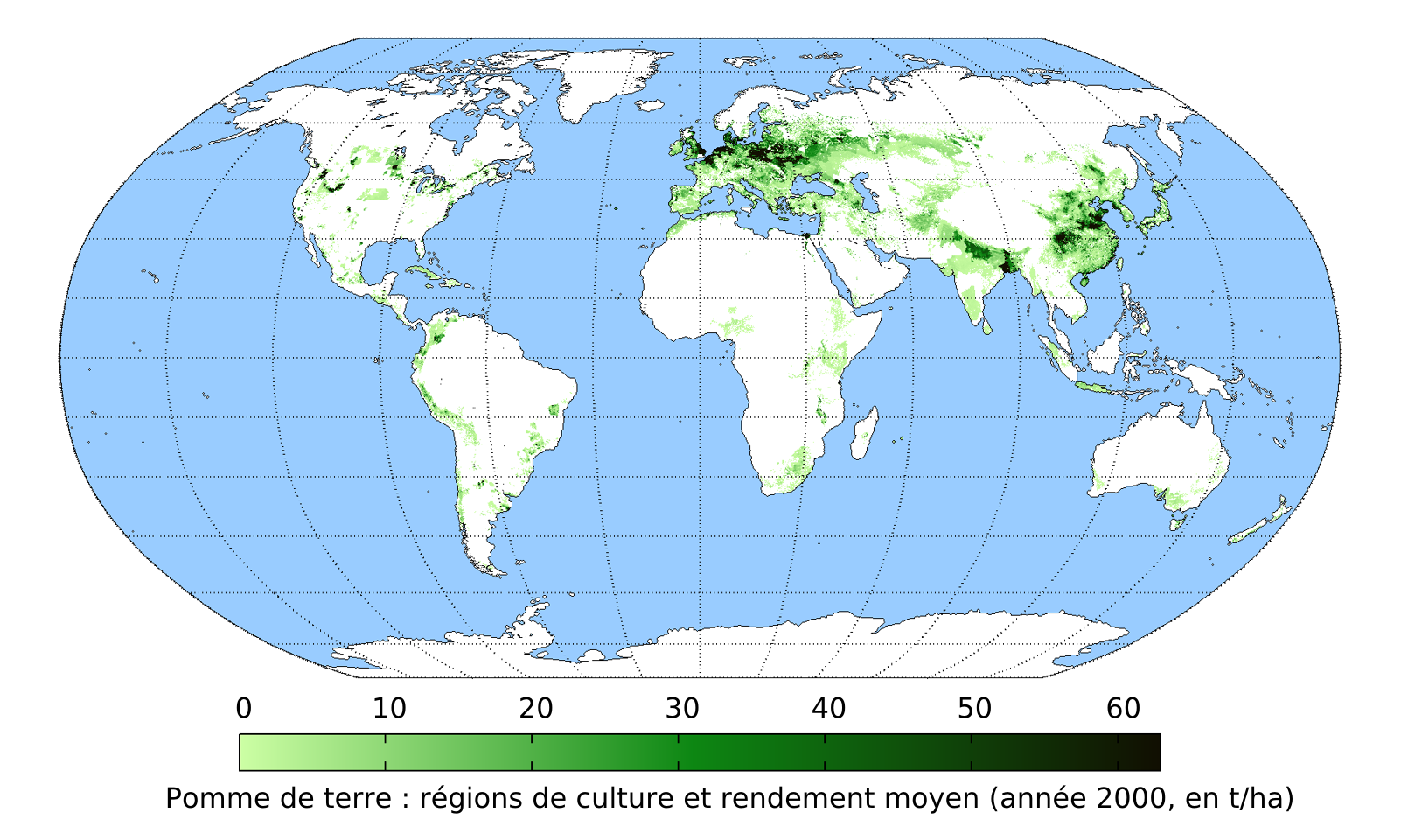 Carte des cultures de pomme de terre dans le monde et indication du rendement (version française)